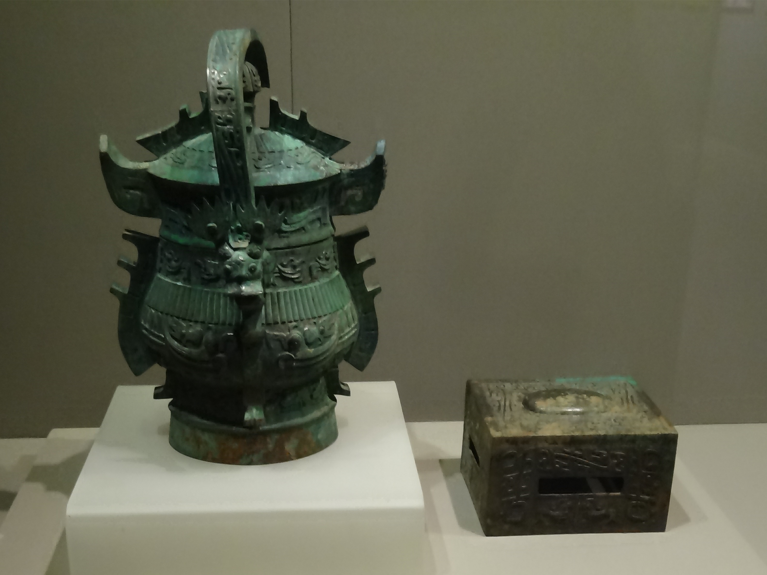 户卣乙和2号禁，西周，2012年石鼓山出土，现藏于宝鸡青铜器博物院